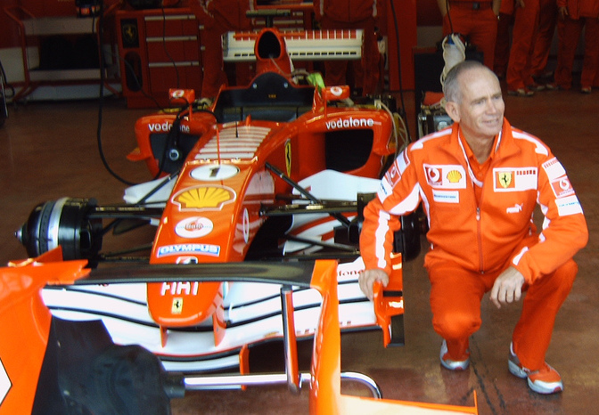 Scuderia Ferrari Chief Desginer Rory Byrne